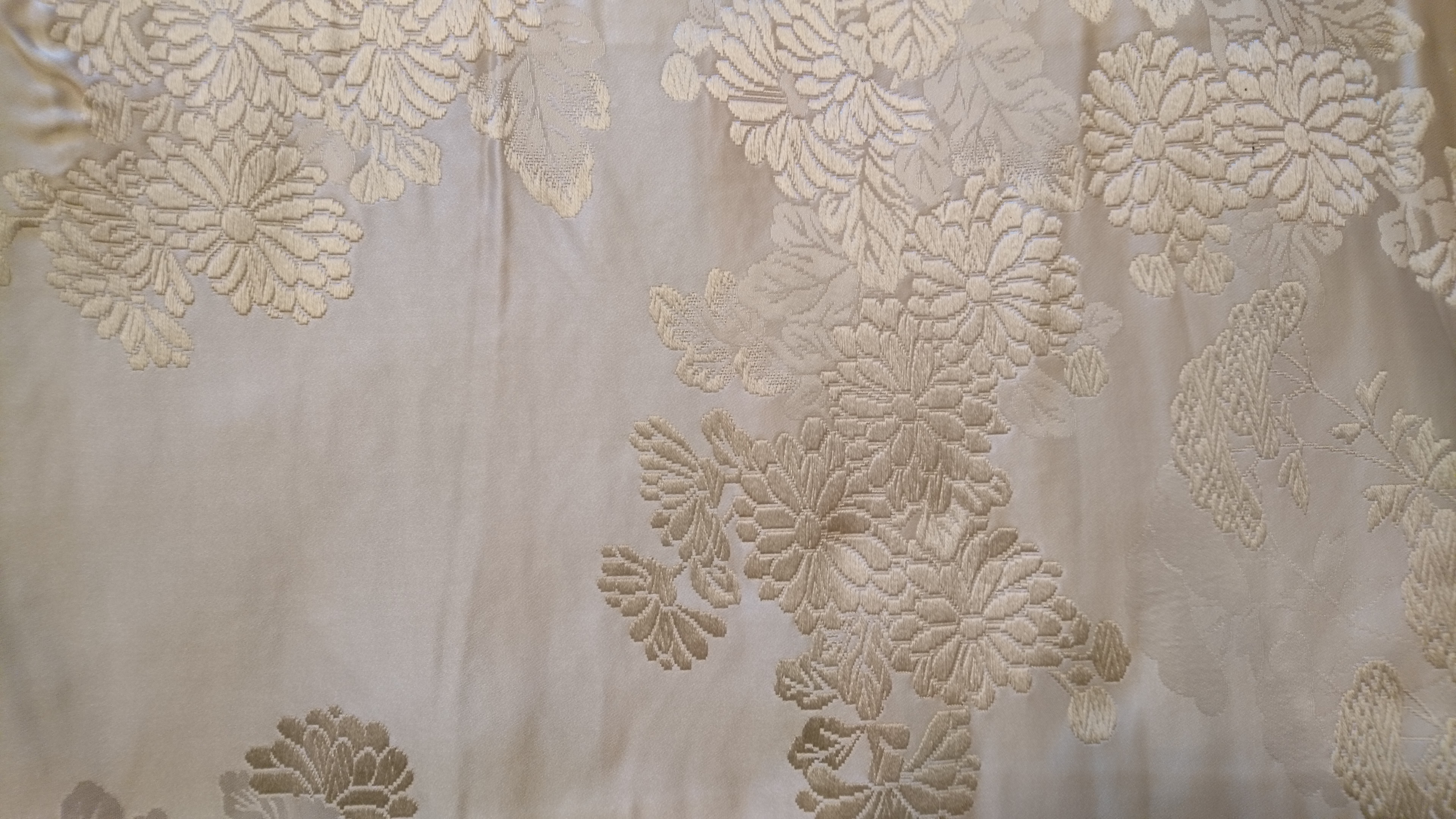 昭和40~50年代に丹後地方で製織された染色していない西陣帯の織物。帯の裏地に使用されていた。